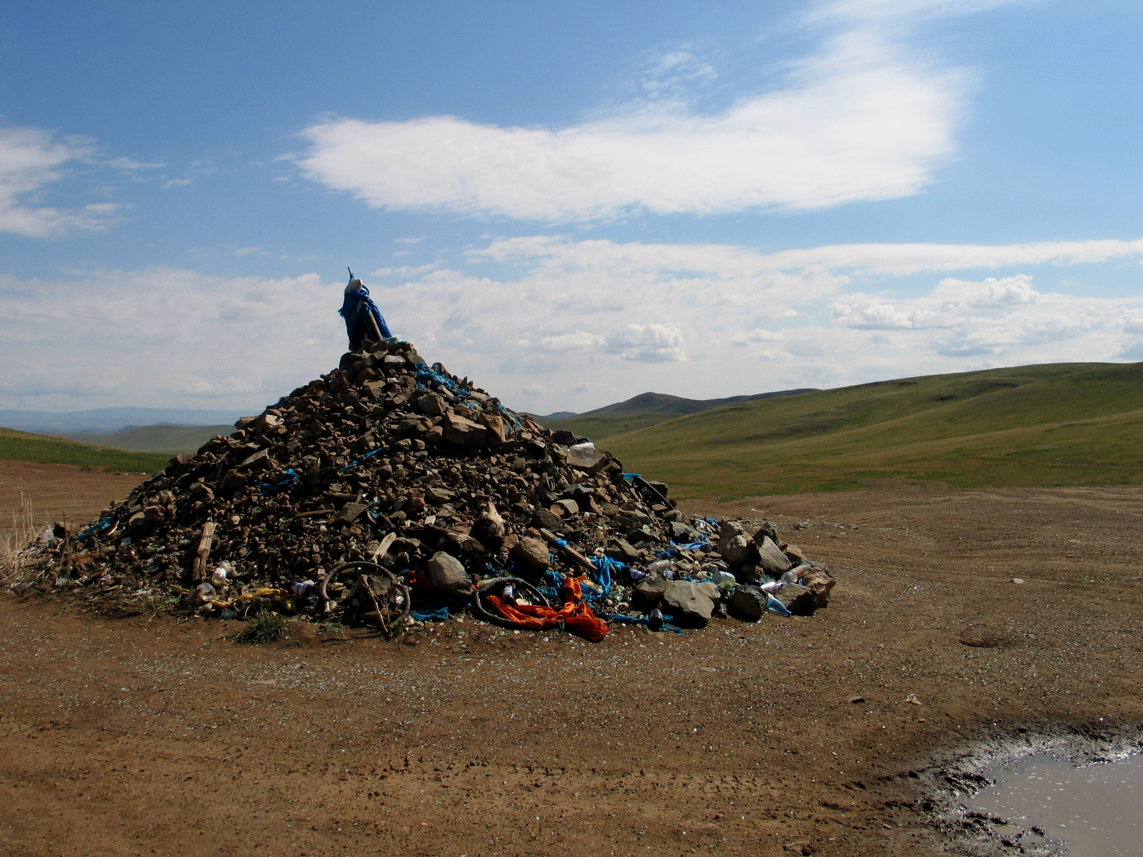 Obo in mongolia